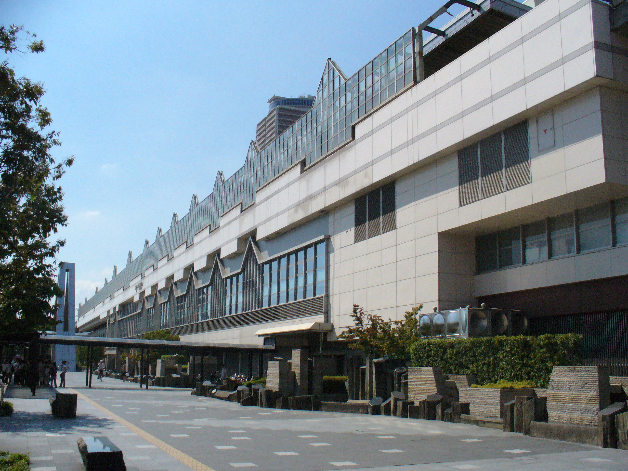 Gifu Station（岐阜駅）,Gifu,Gifu(岐阜県岐阜市)で撮影。岐阜駅南口。